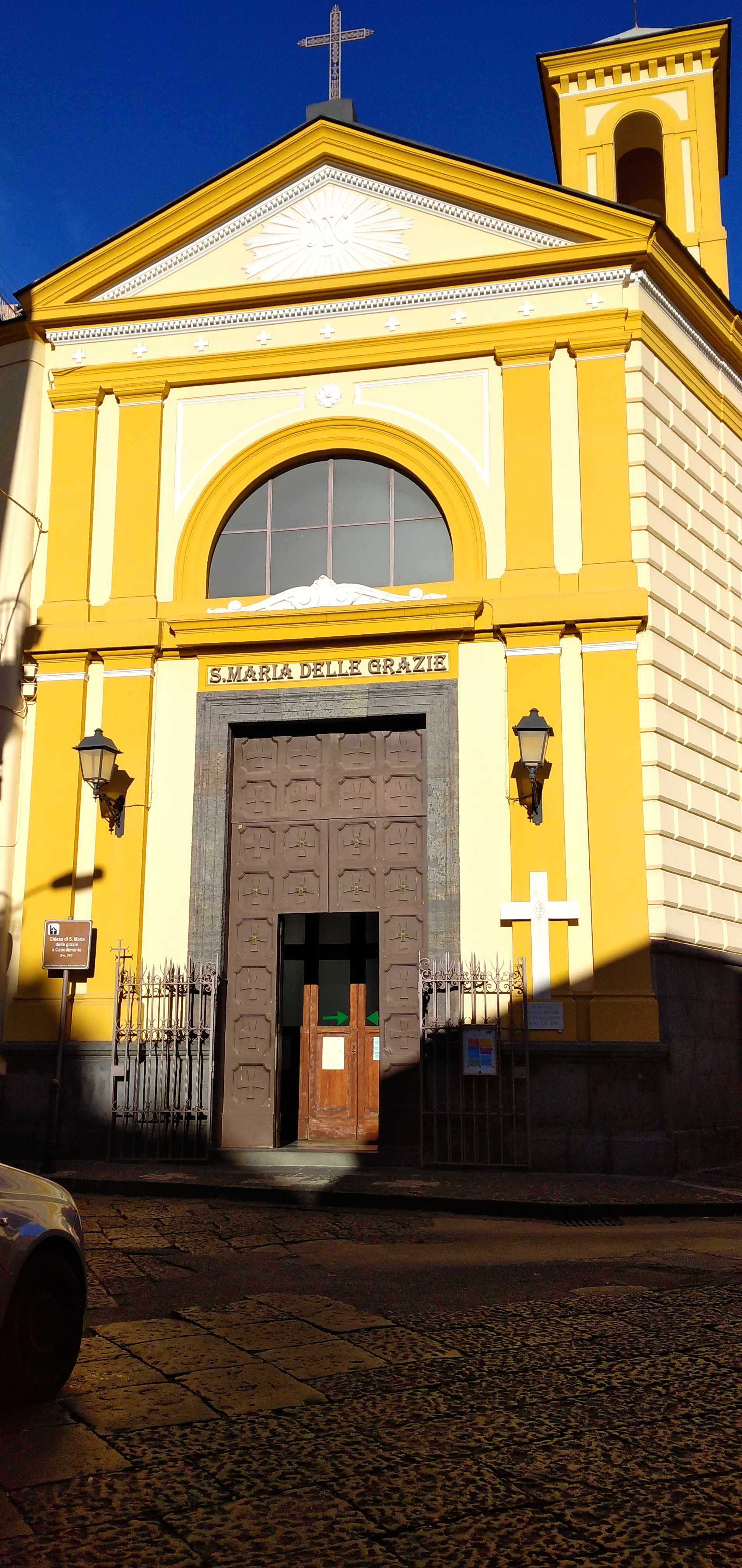 Chiesa di Santa Maria delle Grazie a Capodimonte